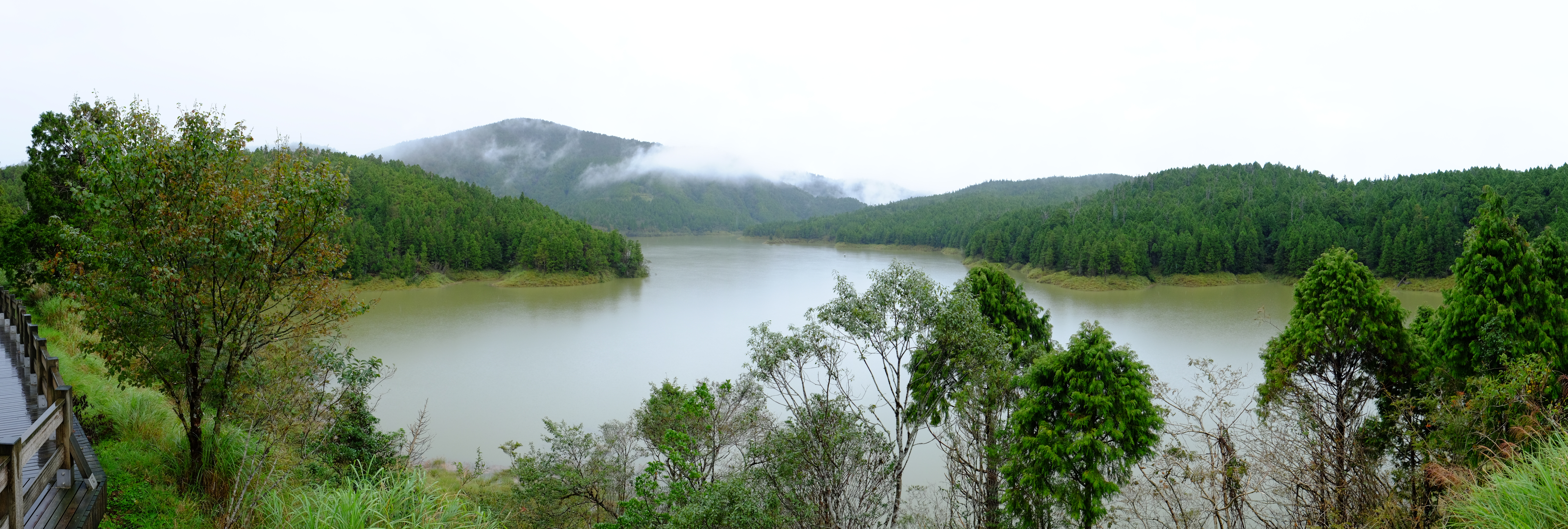 2015翠峰湖